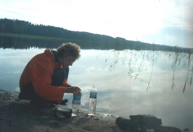 Filtrering av vatten under en överlevnadsutbildning